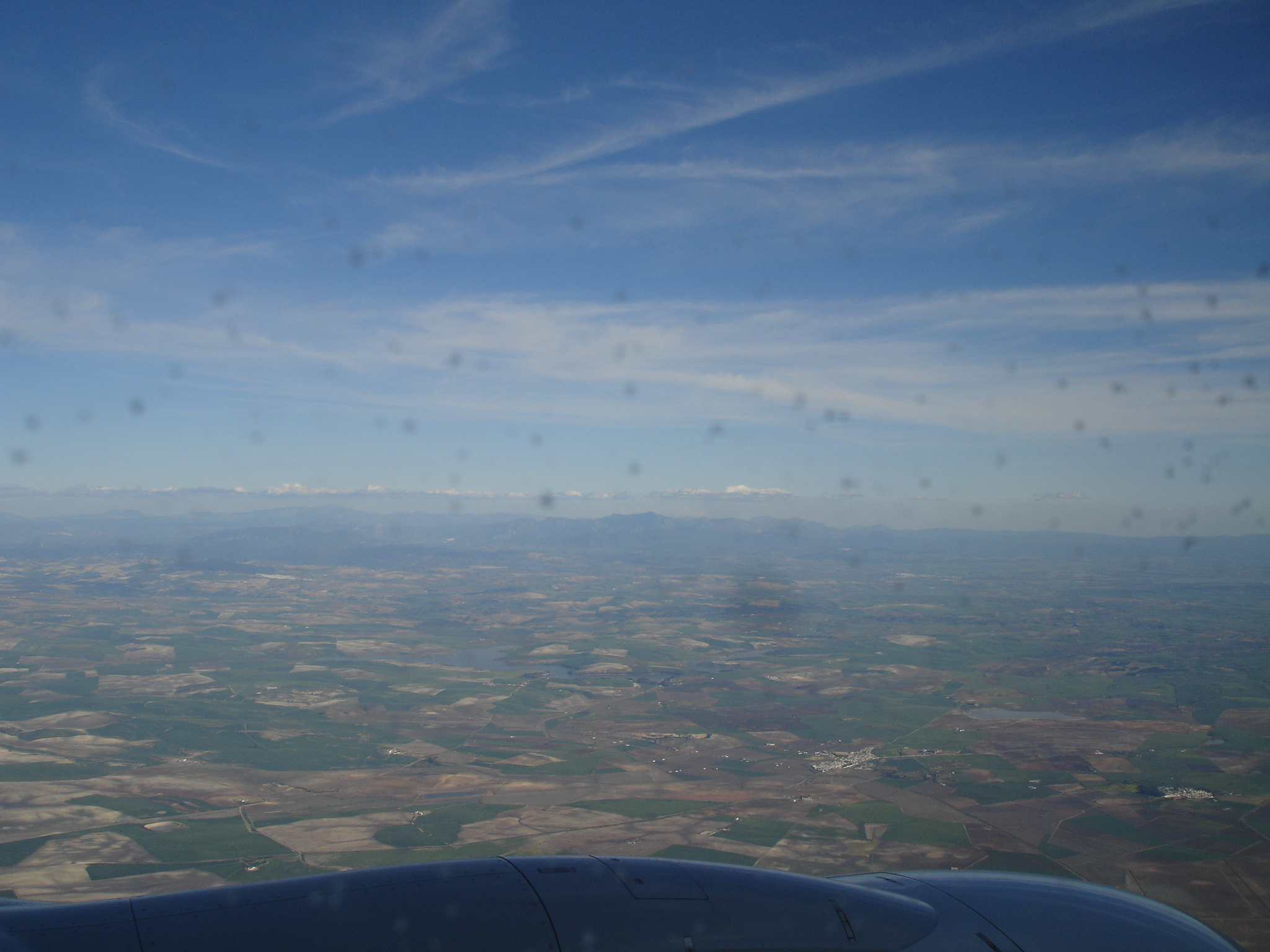 Vista de la parte norte de la Sierra de Cádiz desde un avión aterrizando en el aeropuerto de Jerez